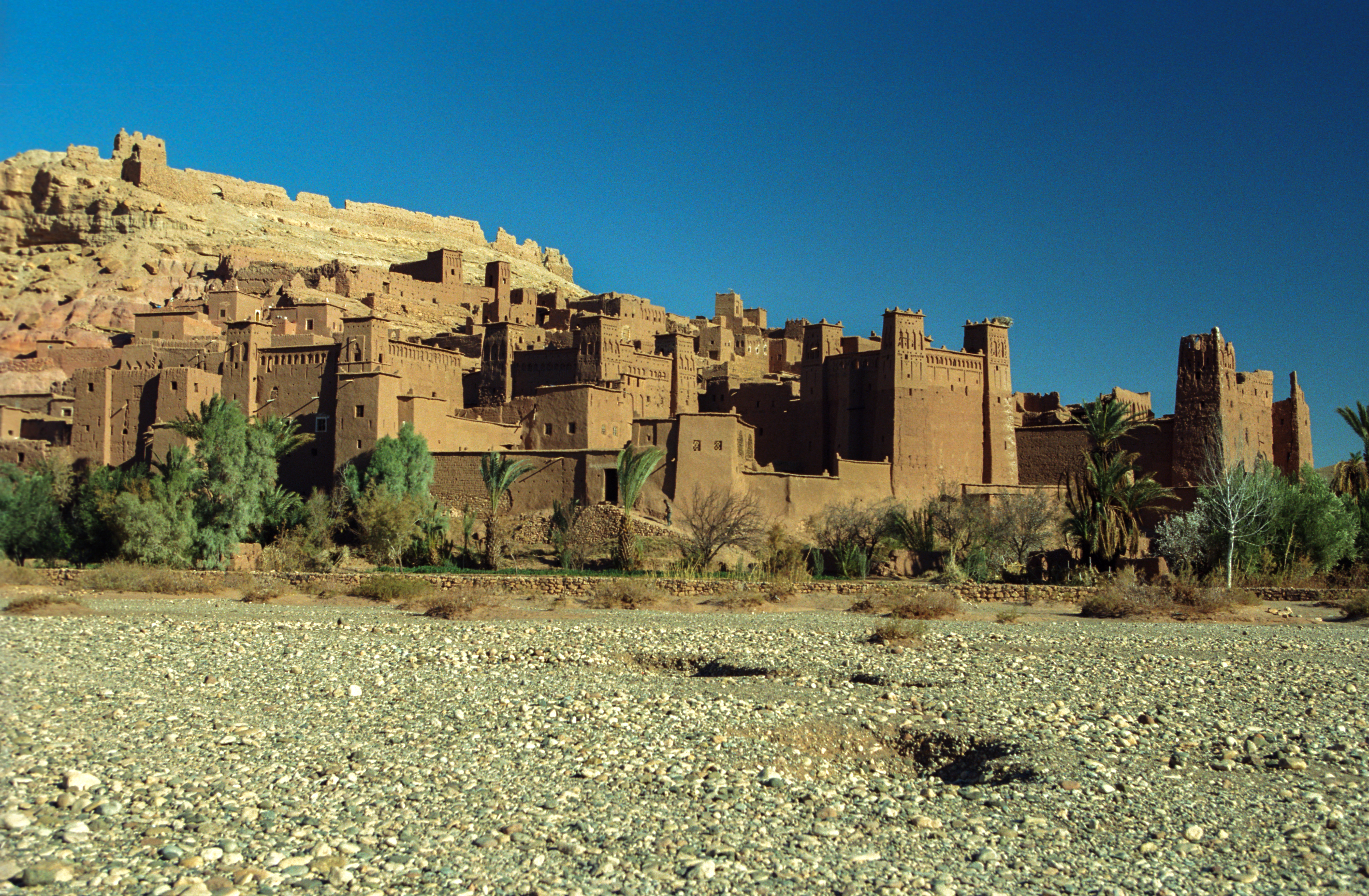 Aït Benhaddou